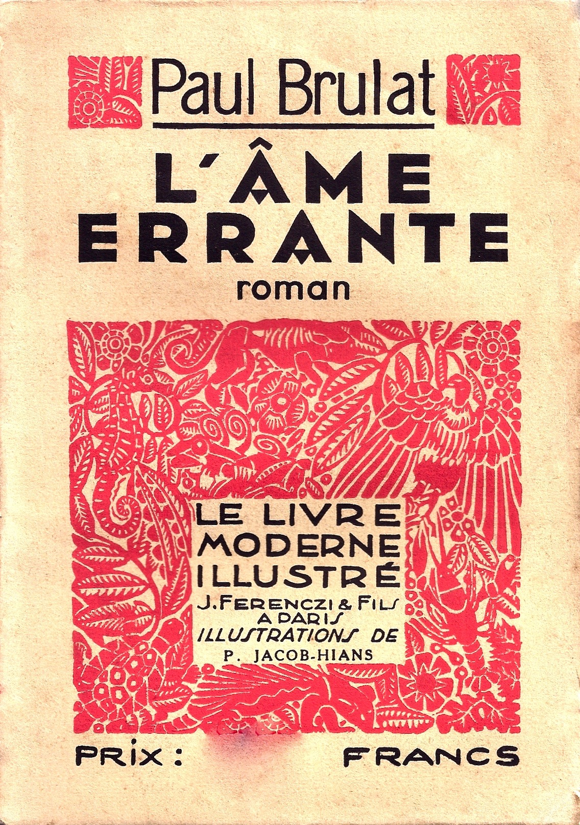 "L'âme errante", Paul Brulat, 1898, couverture.